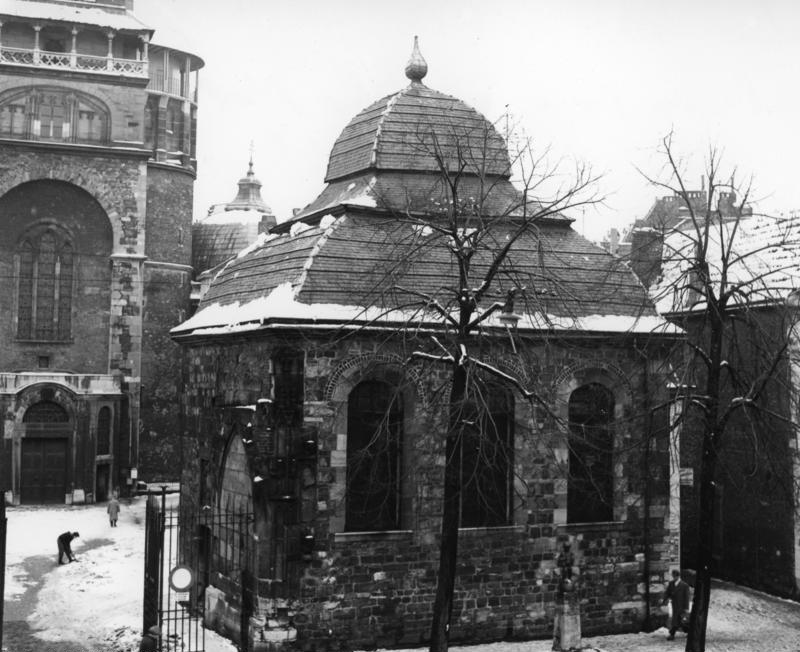 14.1.1959 Aachen Blick zum Dom von der Klostergasse aus Information added by Wikimedia users.Baptisterium (Taufkapelle) des Aachener Domes, davor zwischen den Bäumen der 1954 wiedererrichtete Brunnen Fischpüddelchen (Fischpüddelchen).